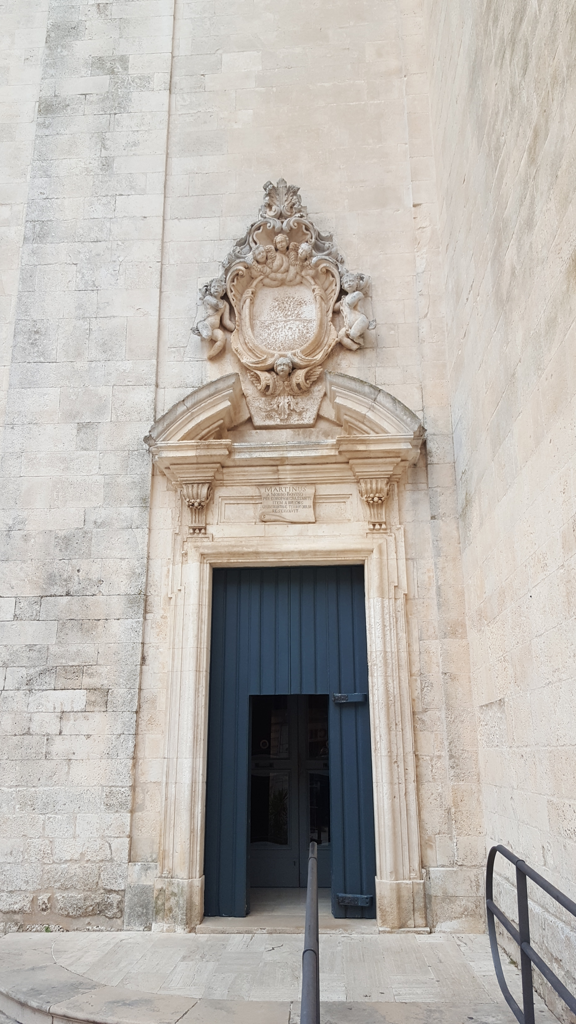 Porta Meridionale della Basilica di San Martino a Martina Franca